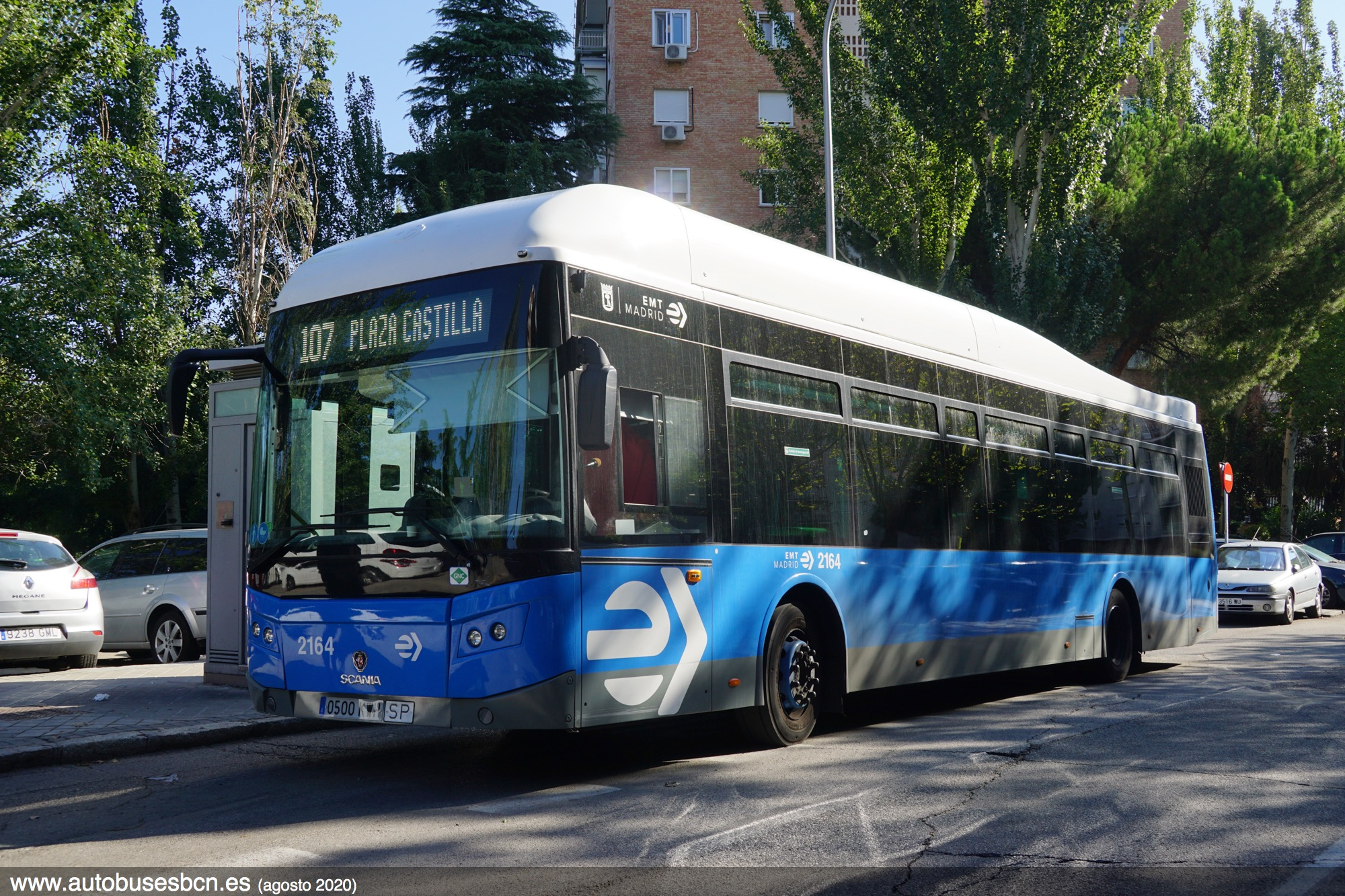 107 EMT Madrid final de Hortaleza en la calle Santa Adela, agosto 2020